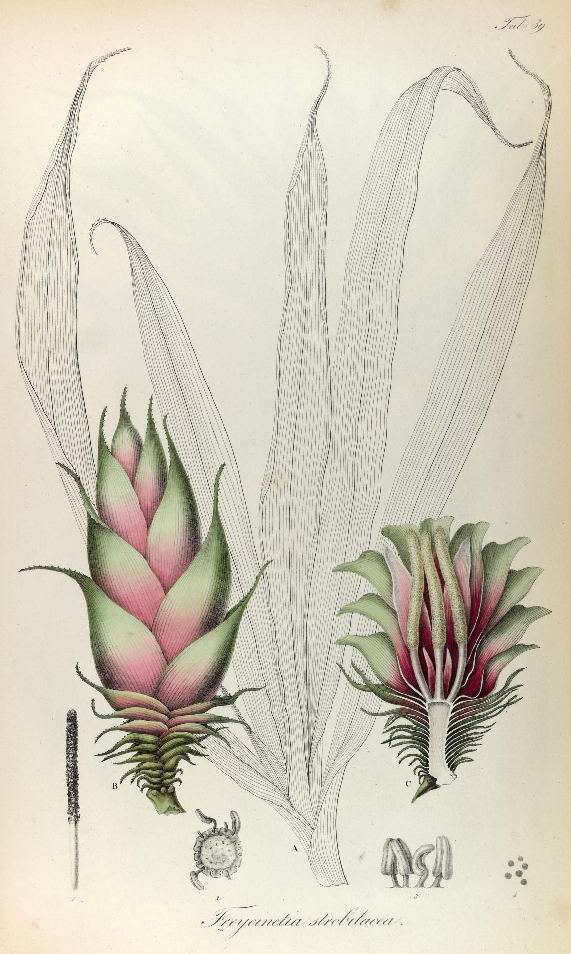 p y. v //fYs./s //vv ,j/y. y'/'//.ys y w